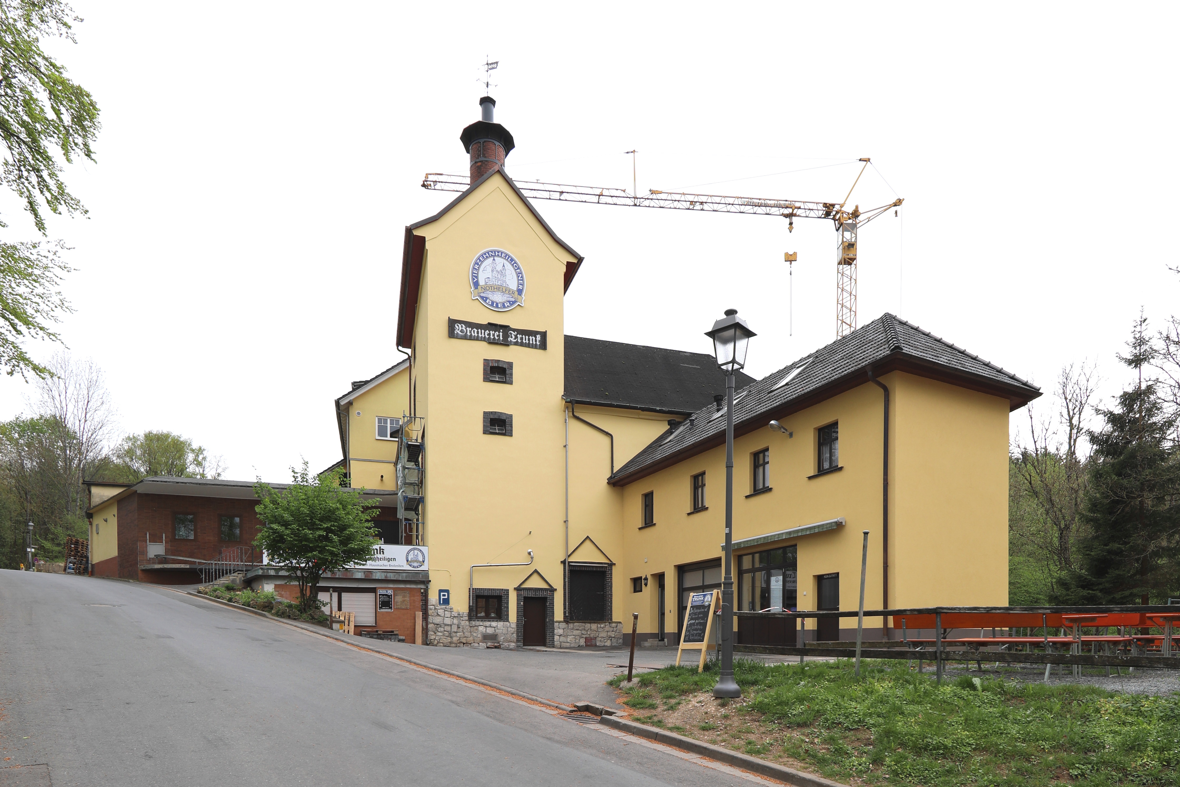 Brauerei Trunk Vierzehnheiligen, Bad Staffelstein